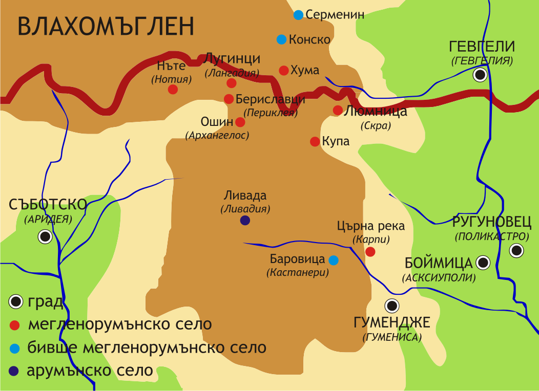 Карта на областта Влахомъглен. По данни на Теодор Капидан.